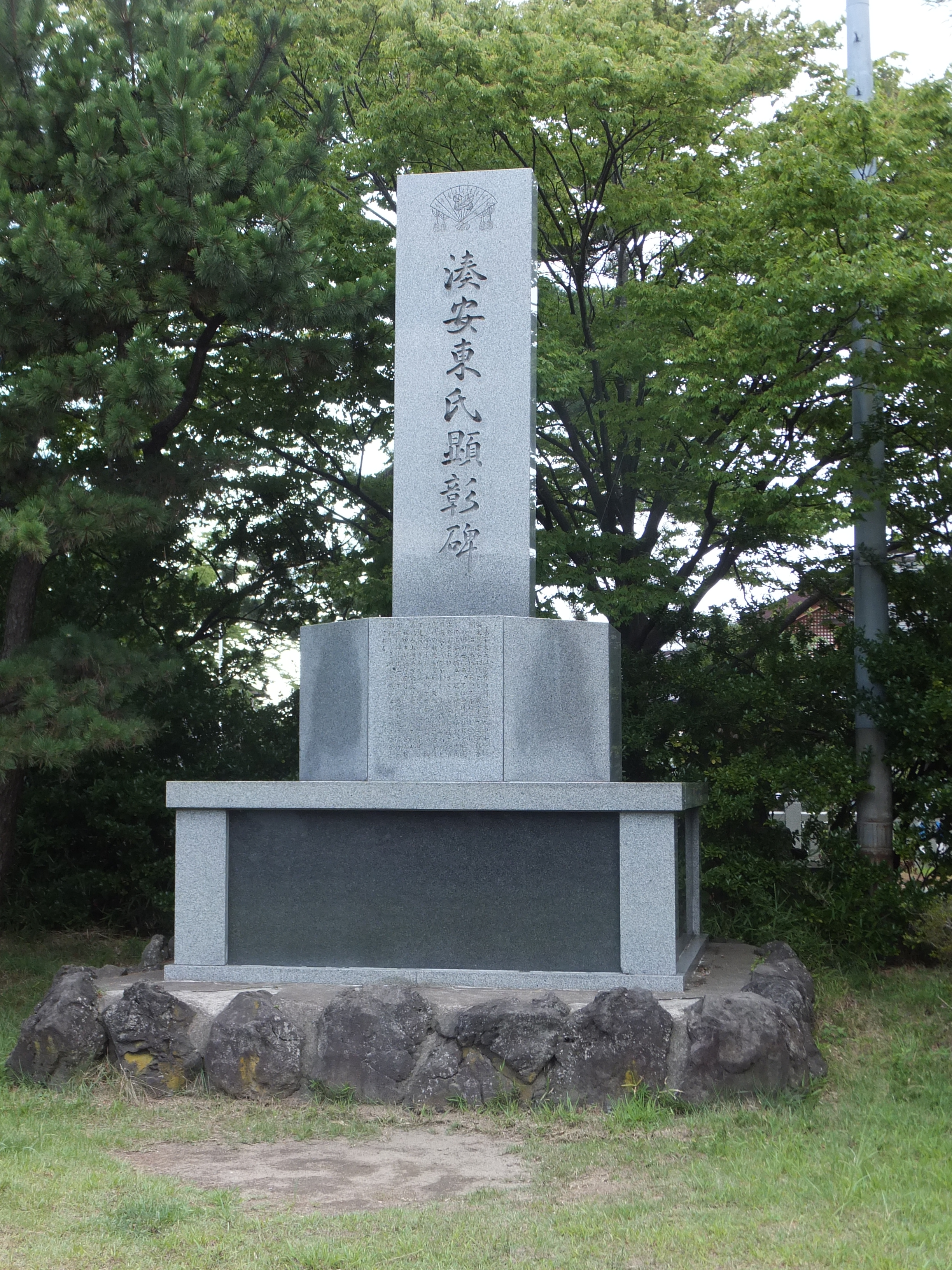 秋田市、土崎街区公園内にある湊安東氏の顕彰碑。同公園は湊安東氏が拠った湊城の跡地とされる。